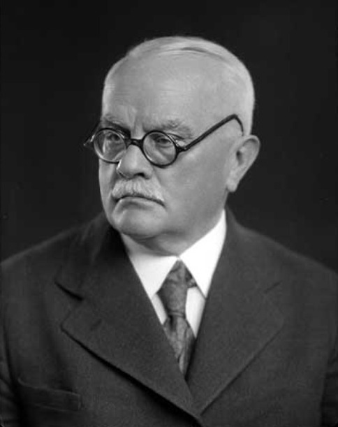 PhDr. Jiří Stanislav Guth-Jarkovský (1861–1943), středoškolský profesor a ceremoniář prezidenta republiky